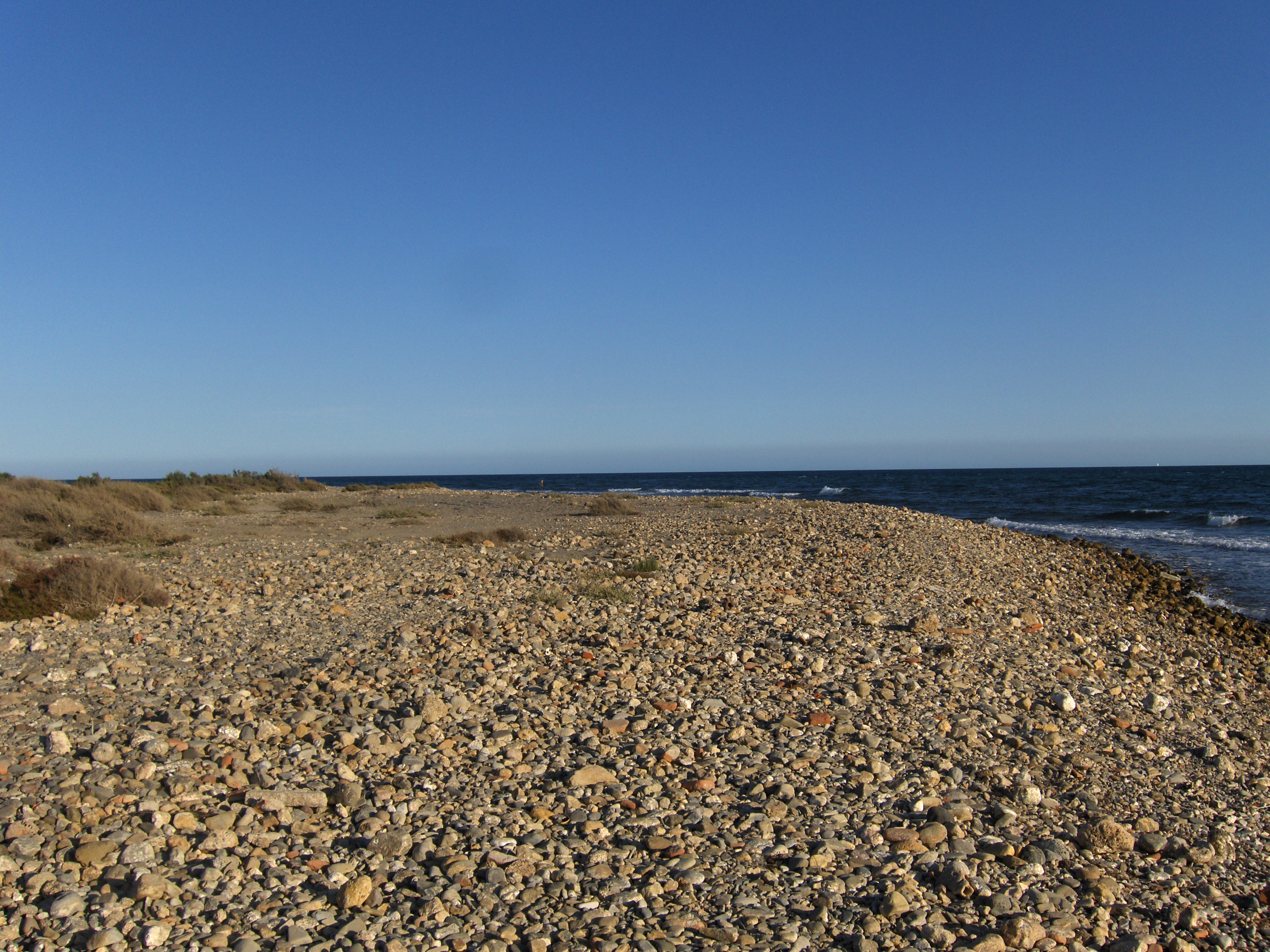 Desembocadura del Río Andarax, en Almería